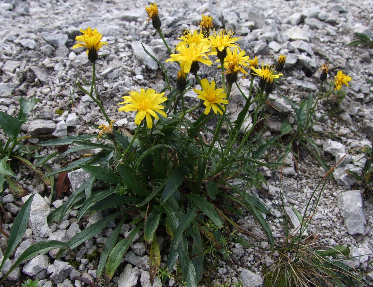 Crepis jacquini